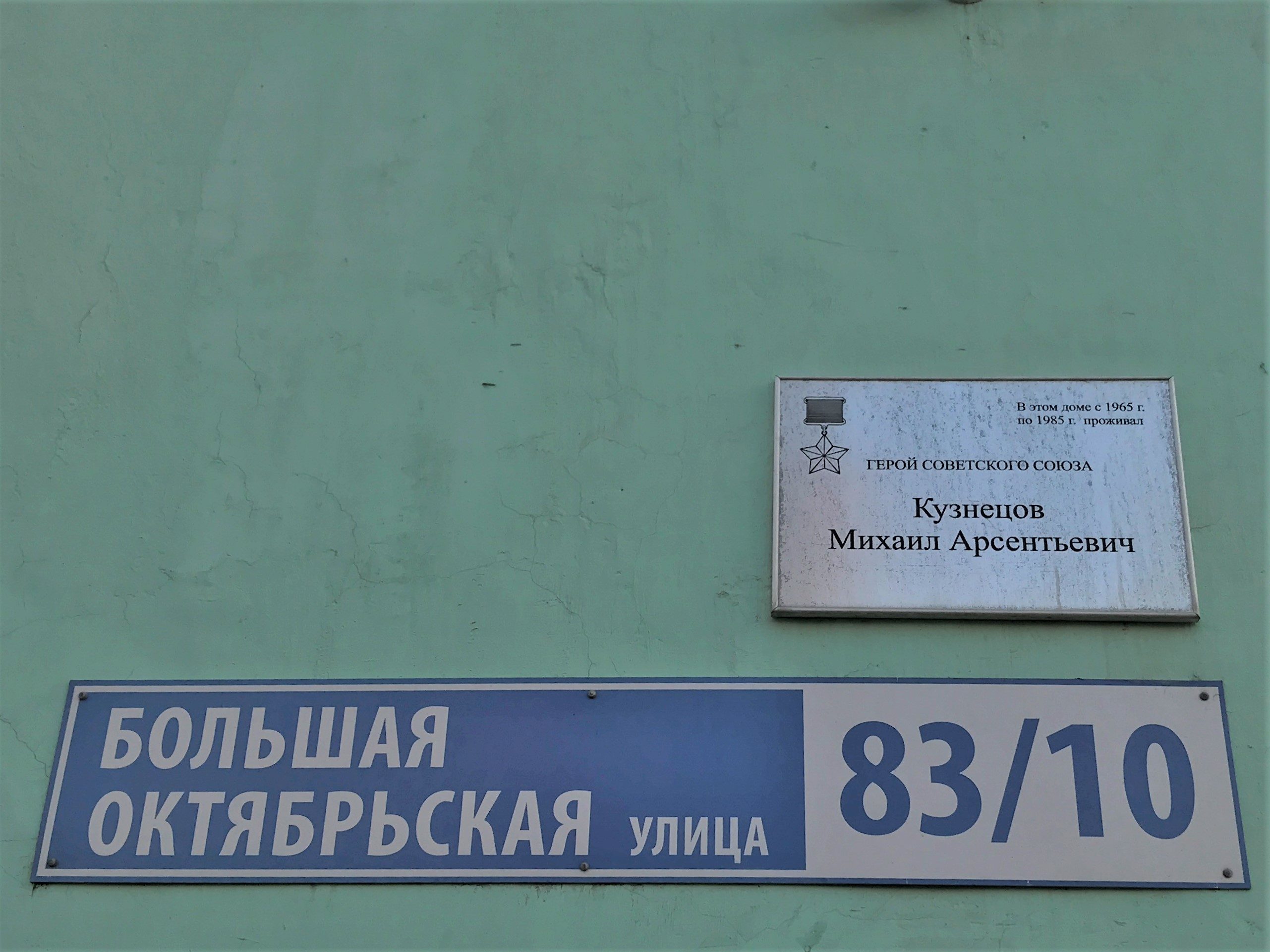 Мемориальная доска Кузнецову Михаилу Арсентьевичу